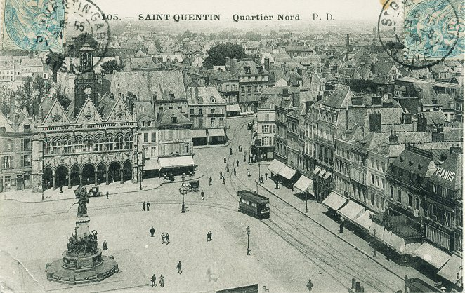 St Quentin (Aisne - France) : quartier nord.